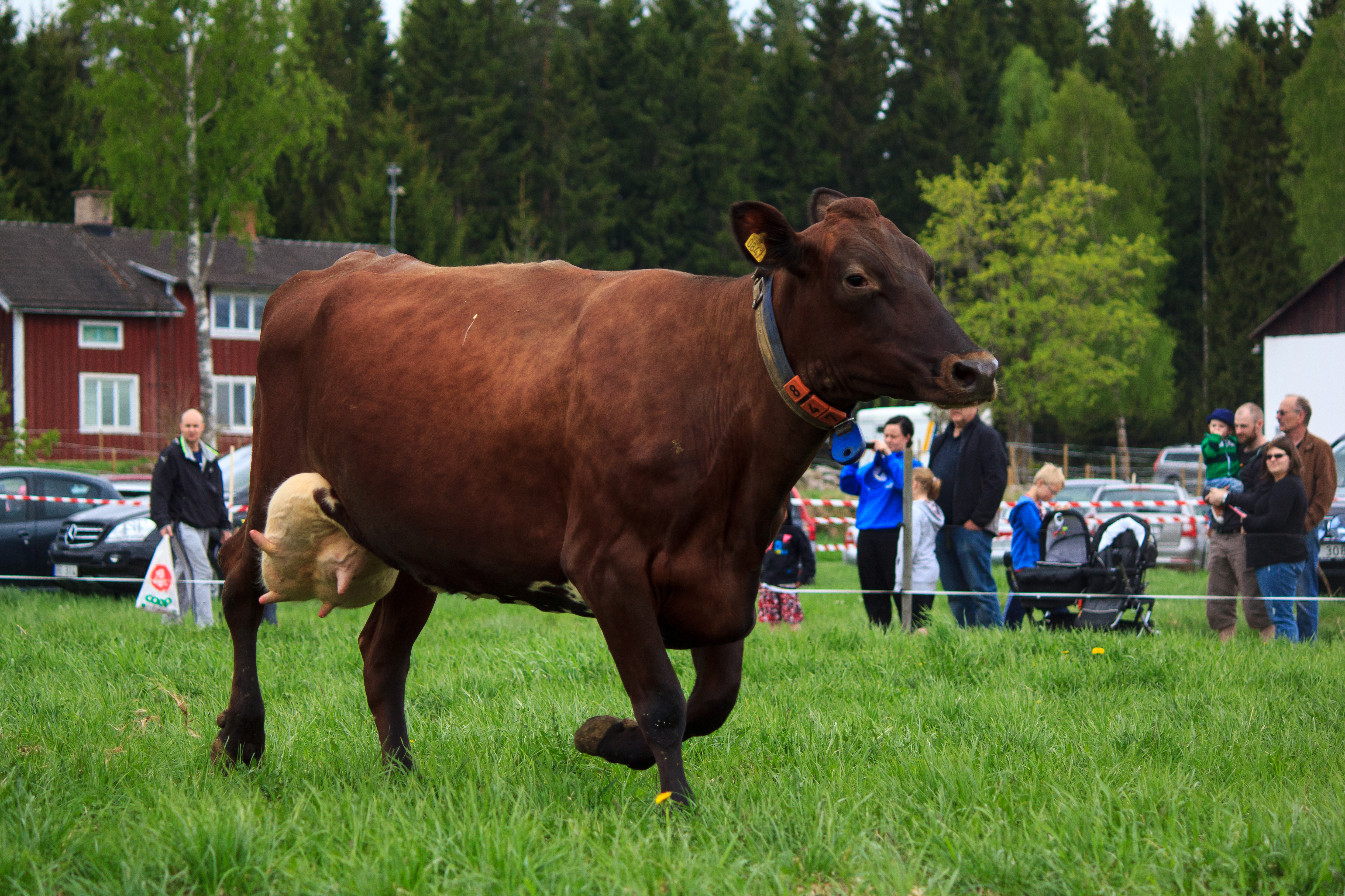 Betessläpp på Janpers lantbruk (mjölkleverantör till Coop/Grådö mejeri) i Västerby, Säters kommun, 2013